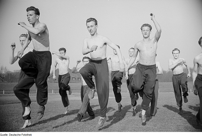 Original image description from the Deutsche Fotothek Studenten während des Trainings